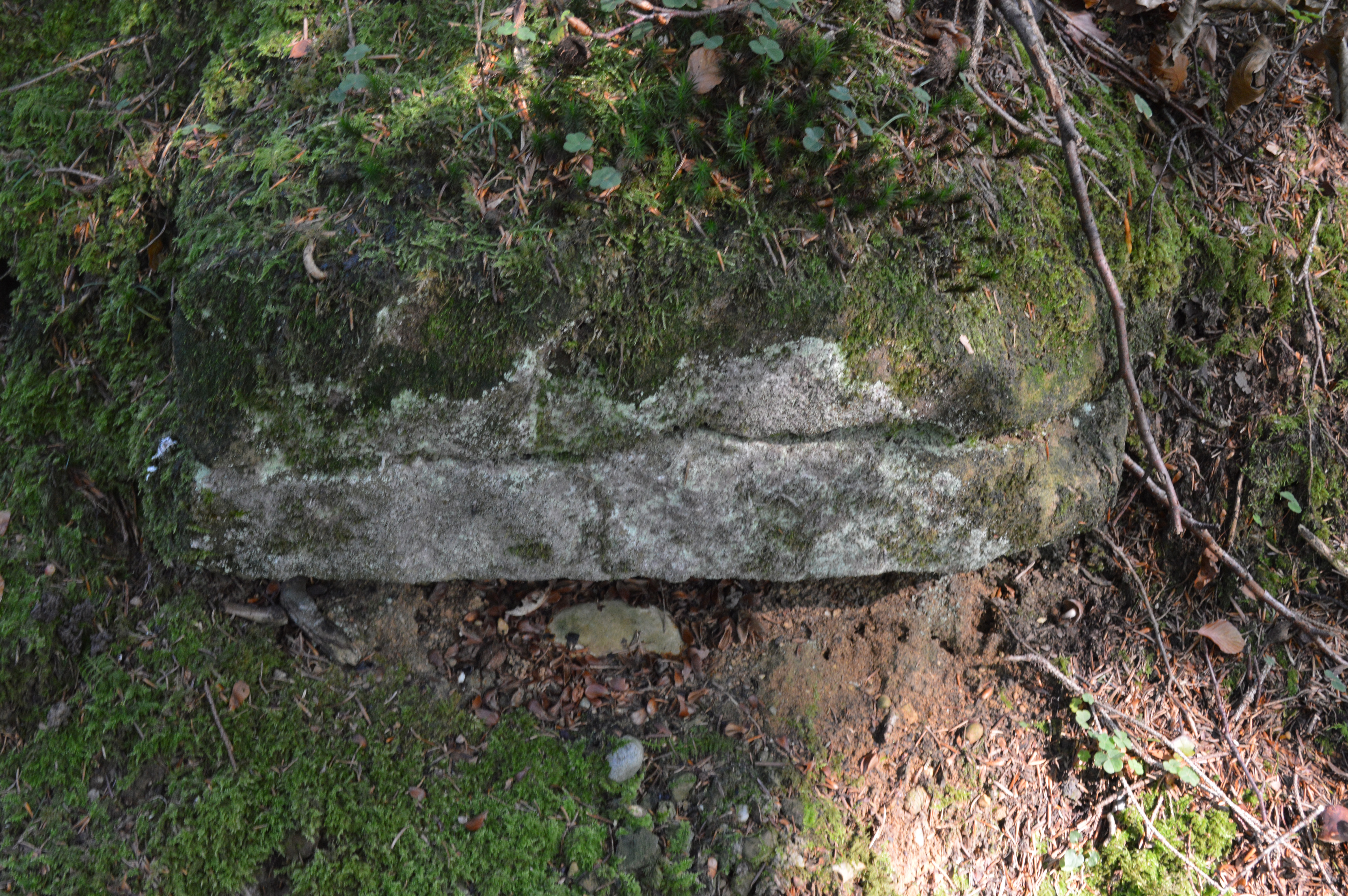 Stein am Hang bei der Waldburg in Häggenschwil